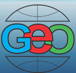 AMEA-nın İnstitut və təşkilatlarının loqoları